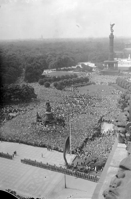 Trauerfeier für die Gefallenen im Weltkriege fand unter Beisein der gesamten Reichsregierung und einer viertausendköpfigen Menschenmenge am 3. August vor dem Reichstag statt. Blick aus der Vogelperspektive auf die vieltausendköpfige Menschanmenge während des 2 Minuten-Gedenkens.